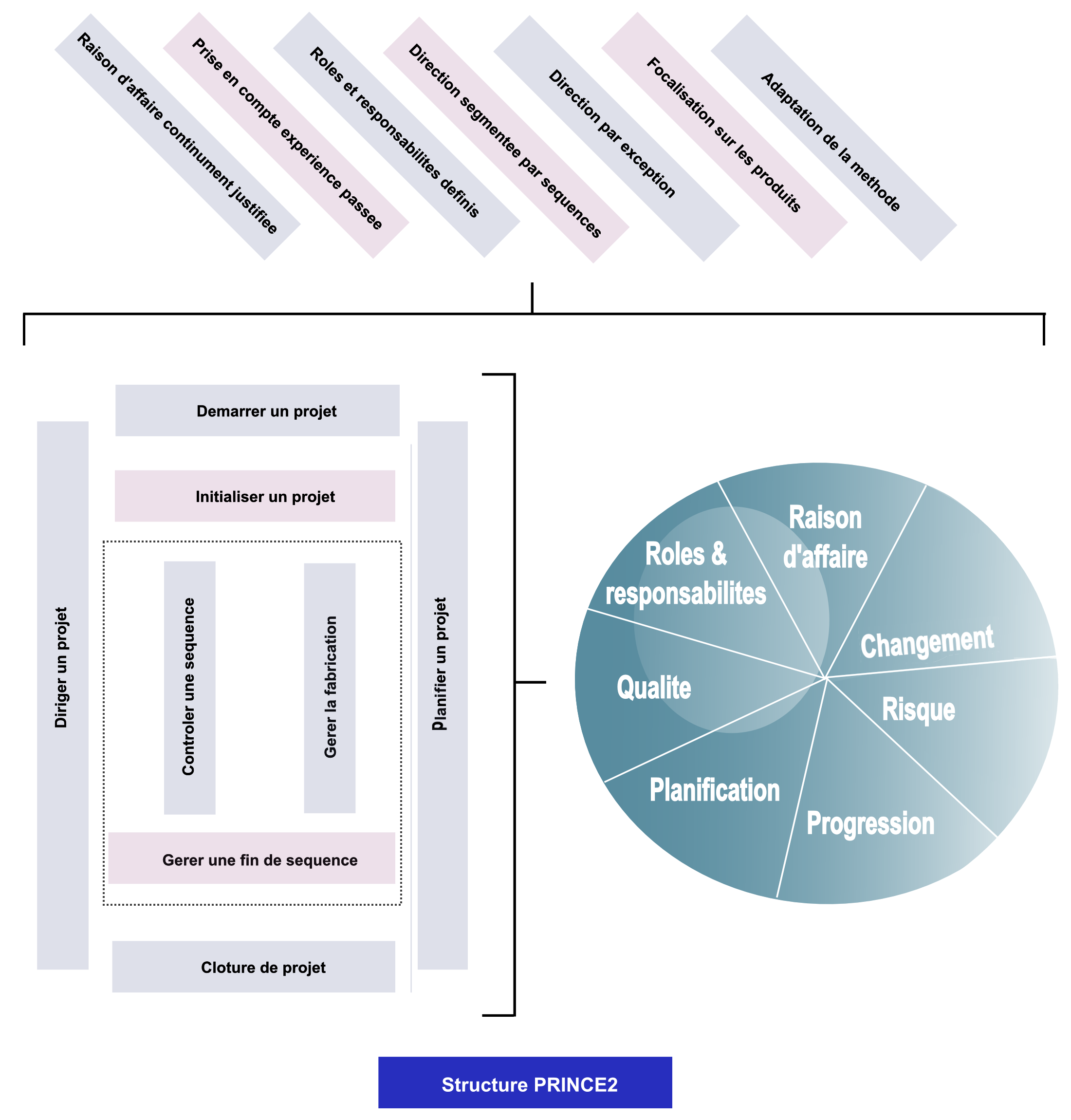 Diagramme décrivant la structure de la méthode de gestion de projet PRINCE2